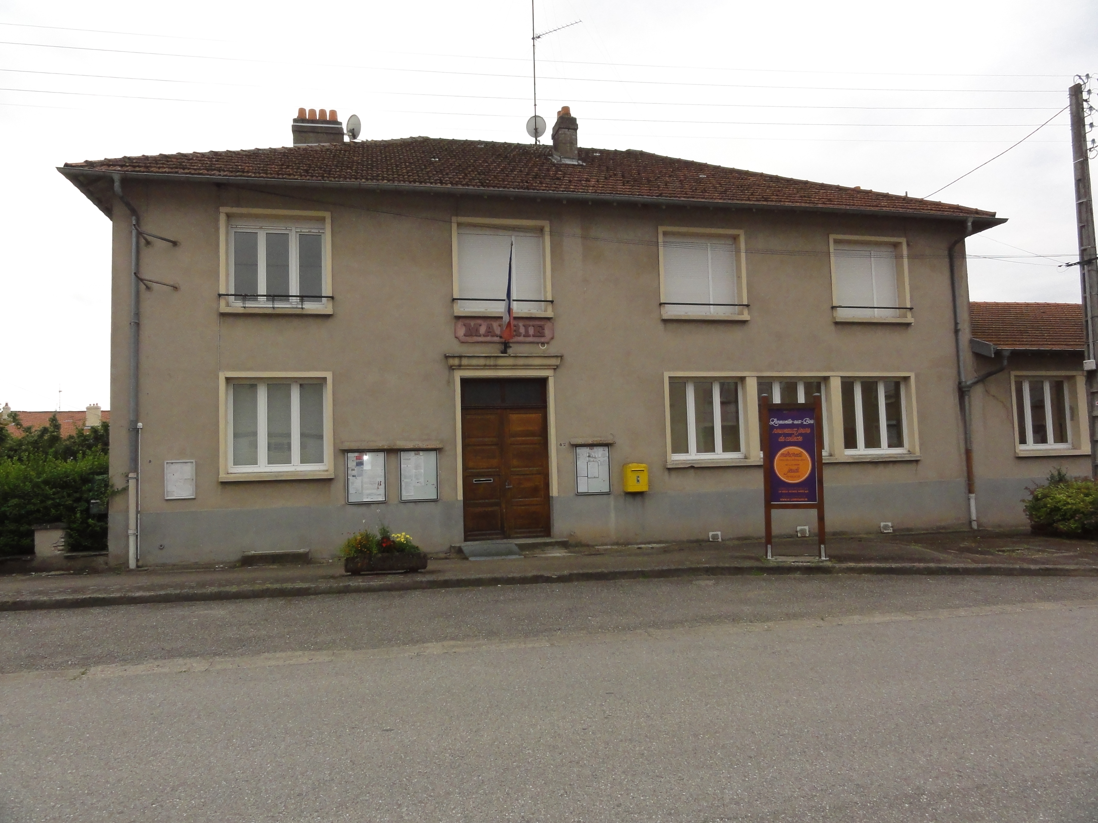 Laneuveville-aux-Bois (M-et-M) mairie